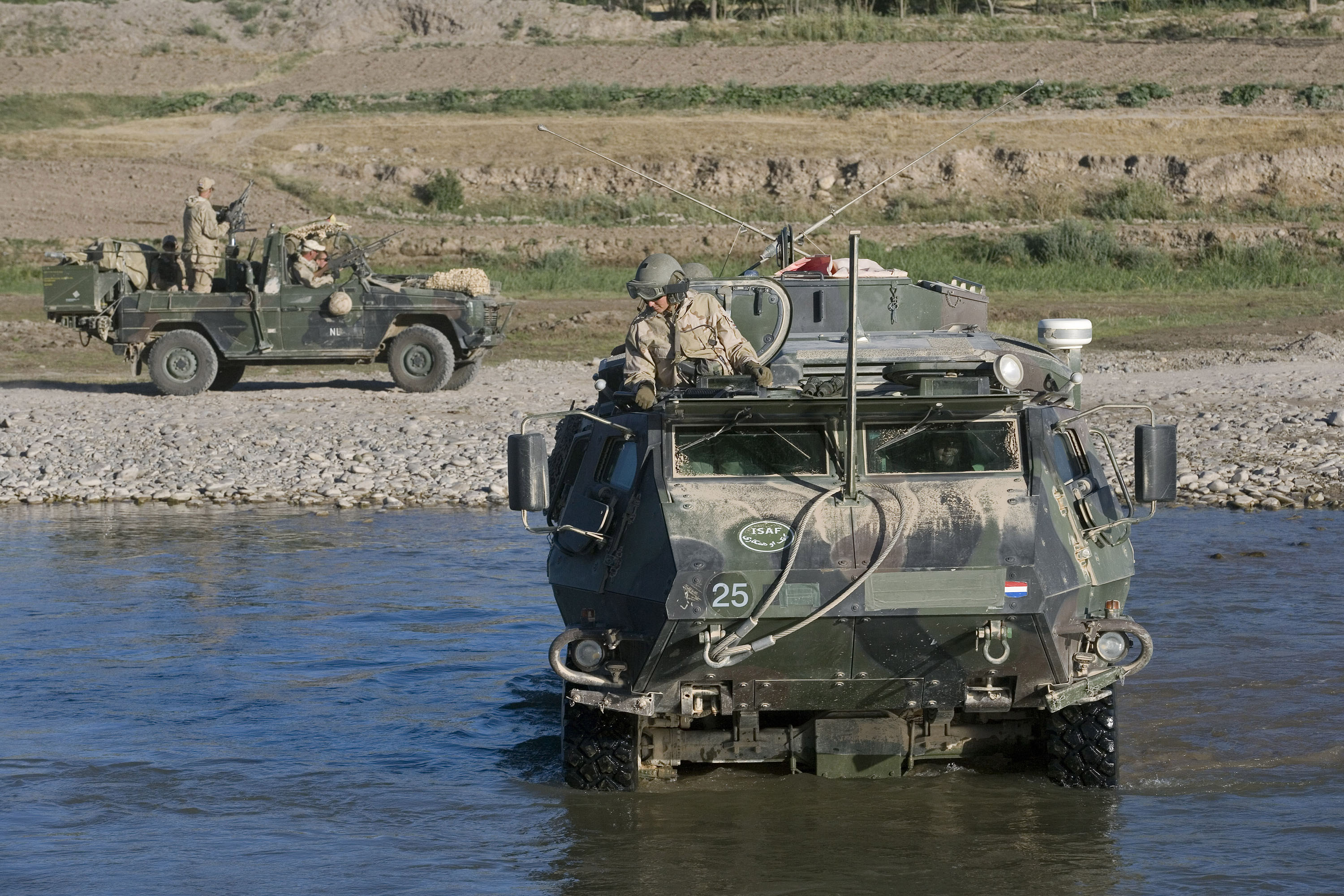 Eenheden van 42 Bataljon Limburgse jagers, in samenwerking met de Afghan National army, bezoeken in het oord Seyyedan een Quala (leefgemeenschap) om er een 'softknock' uit te voeren. Er bestaat een vermoeden dat hier IED's gehuisvest, danwel gefabriceerd worden. IED (Improvised explosive device) Uiteindelijk werden er 2 AK-47 geweren en 3 handgranaten aangetroffen, en in beslag genomen. Foto: Het konvooi steekt een rivier over.